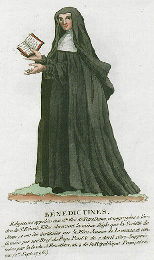 Collection de costumes de tous les ordres monastiques, supprimés à differentes époques, dans la ci-devant Belgique, Bruxelles, Philippe Joseph Maillart et sœur, 1811